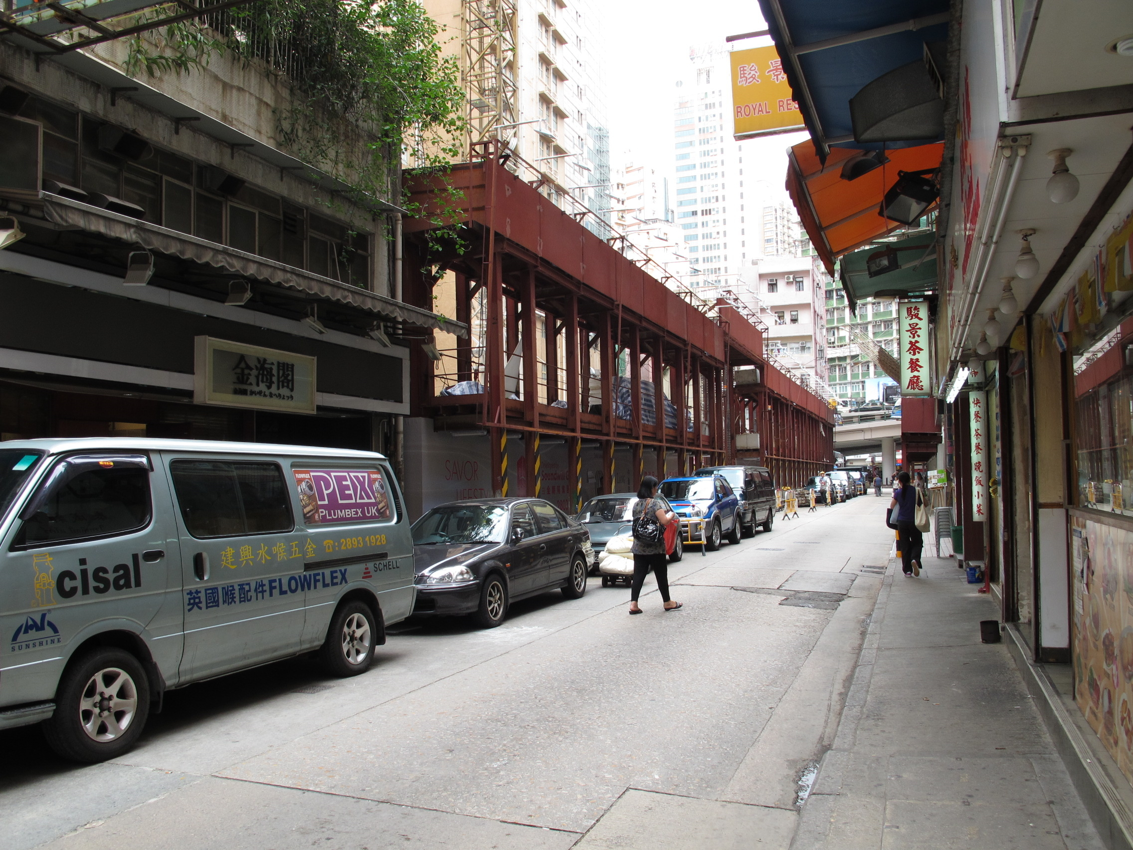 Tang Lung Street, Causeway Bay